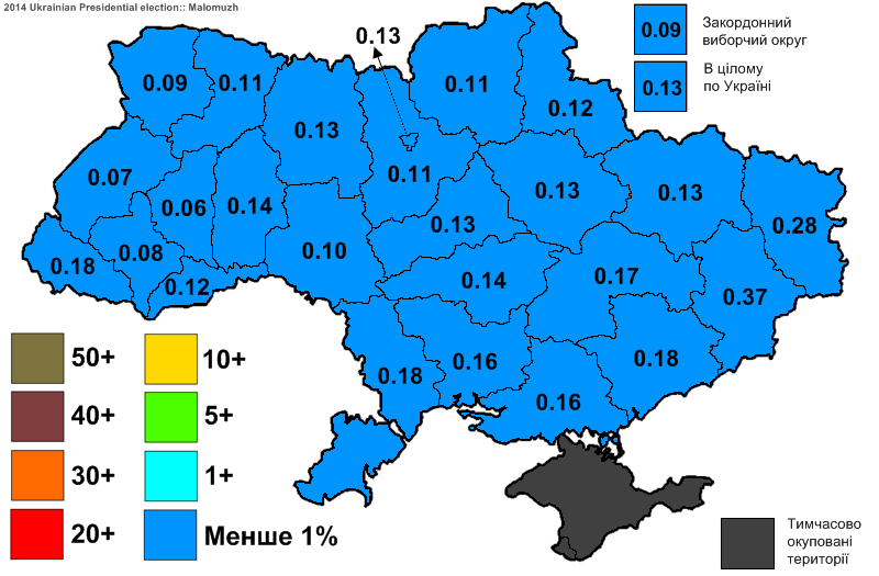 Електоральна підтримка Маломужа Миколи Григоровича на виборах Президента України 2014.